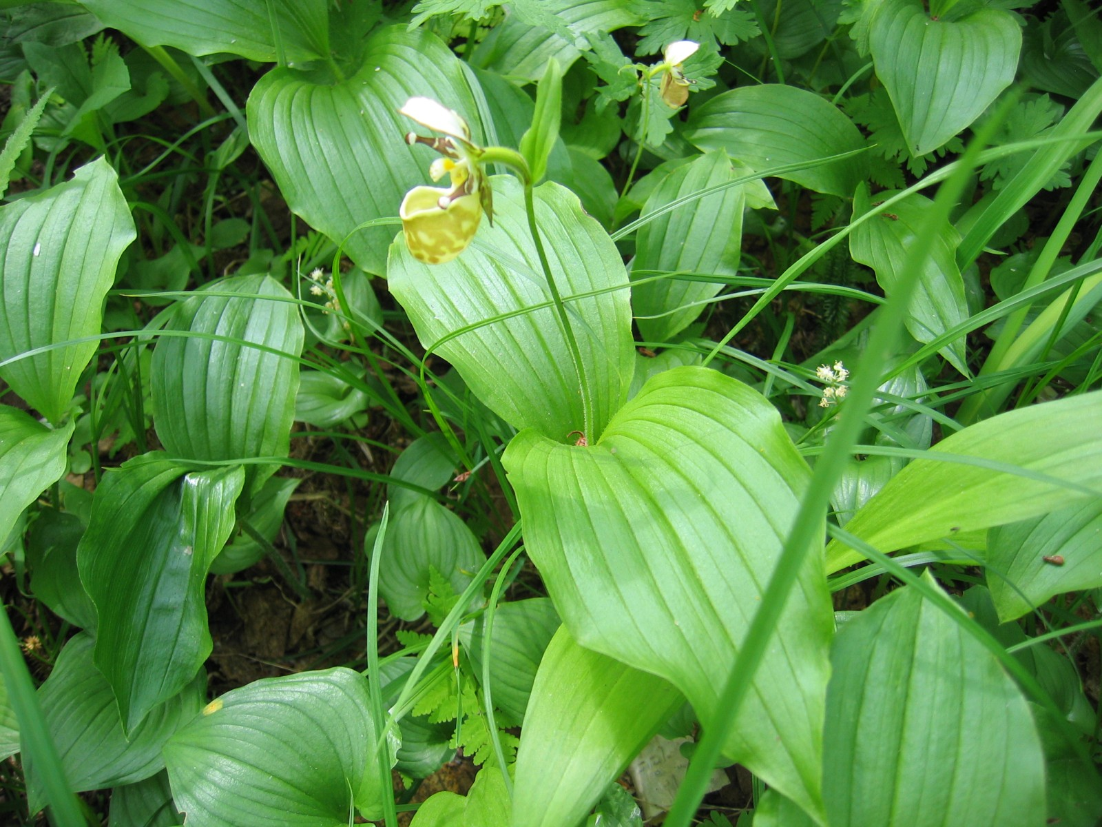 Венерин башмачок Ятабе в лесу (Cypripedium yatabeanum)